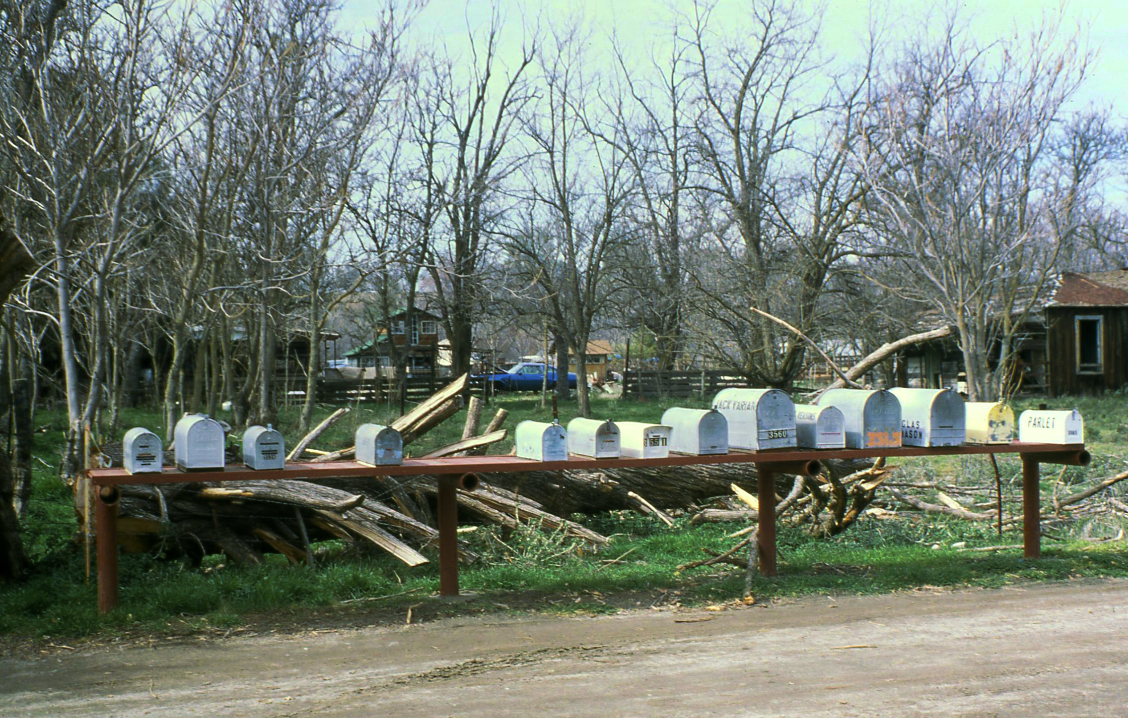 Briefkästen in der Ortsmitte von Parkfield (Kalifornien). Die Briefkästen sind an mehreren Stellen gesammelt, um dem Postverteiler die Arbeit zu erleichtern.